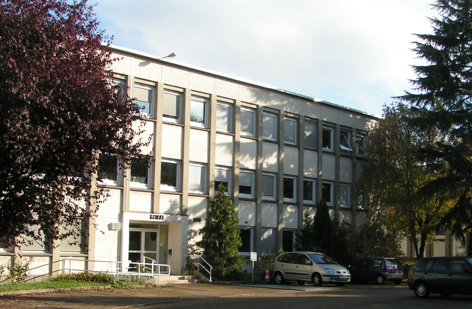 The LIMSI (Laboratoire d'informatique pour la mécanique et les sciences de l'ingénieur) building in Orsay (France).